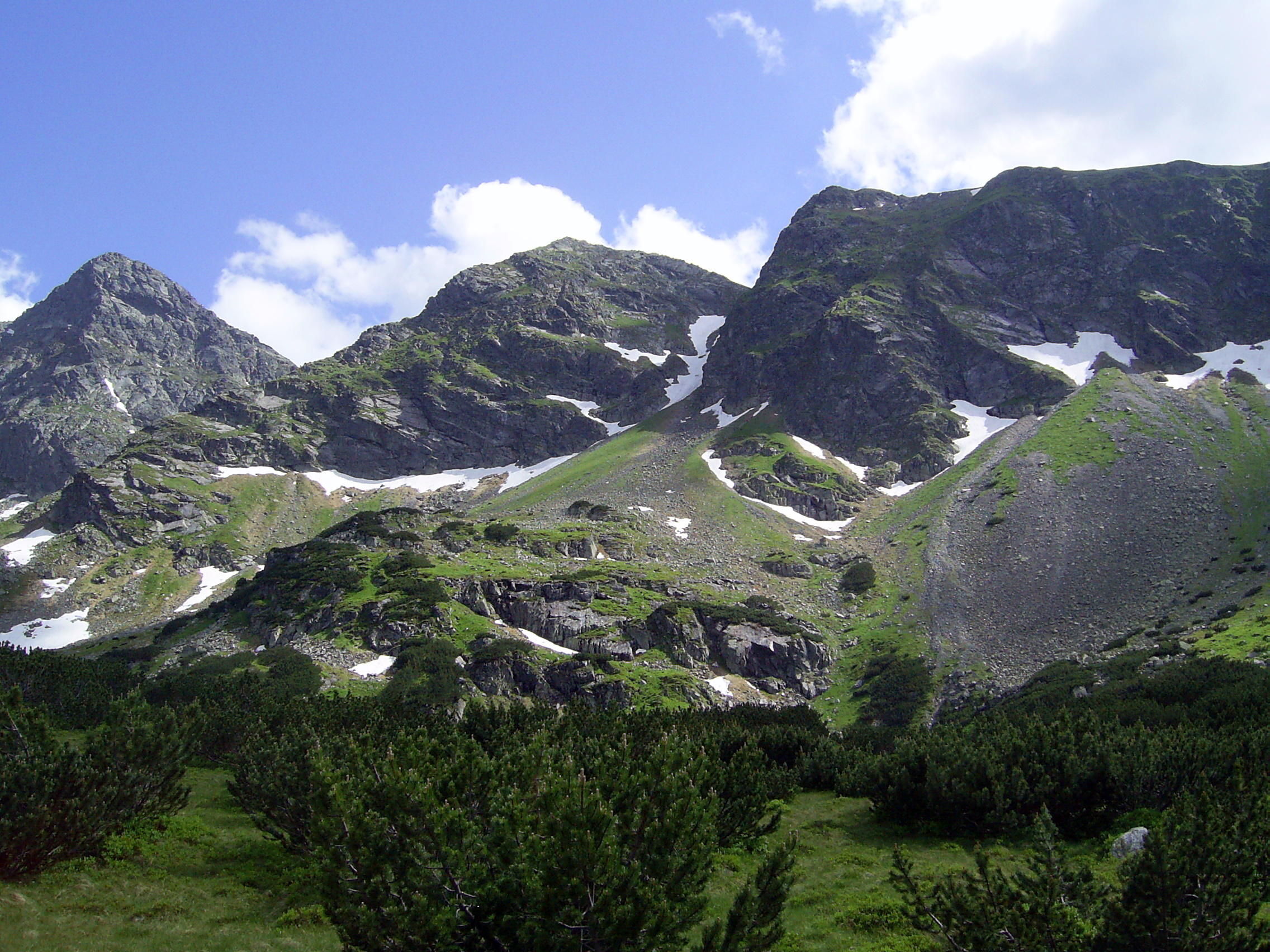 Świnica, Pośrednia Turnia i Skrajna Turnia z Zielonej Doliny Gąsienicowej